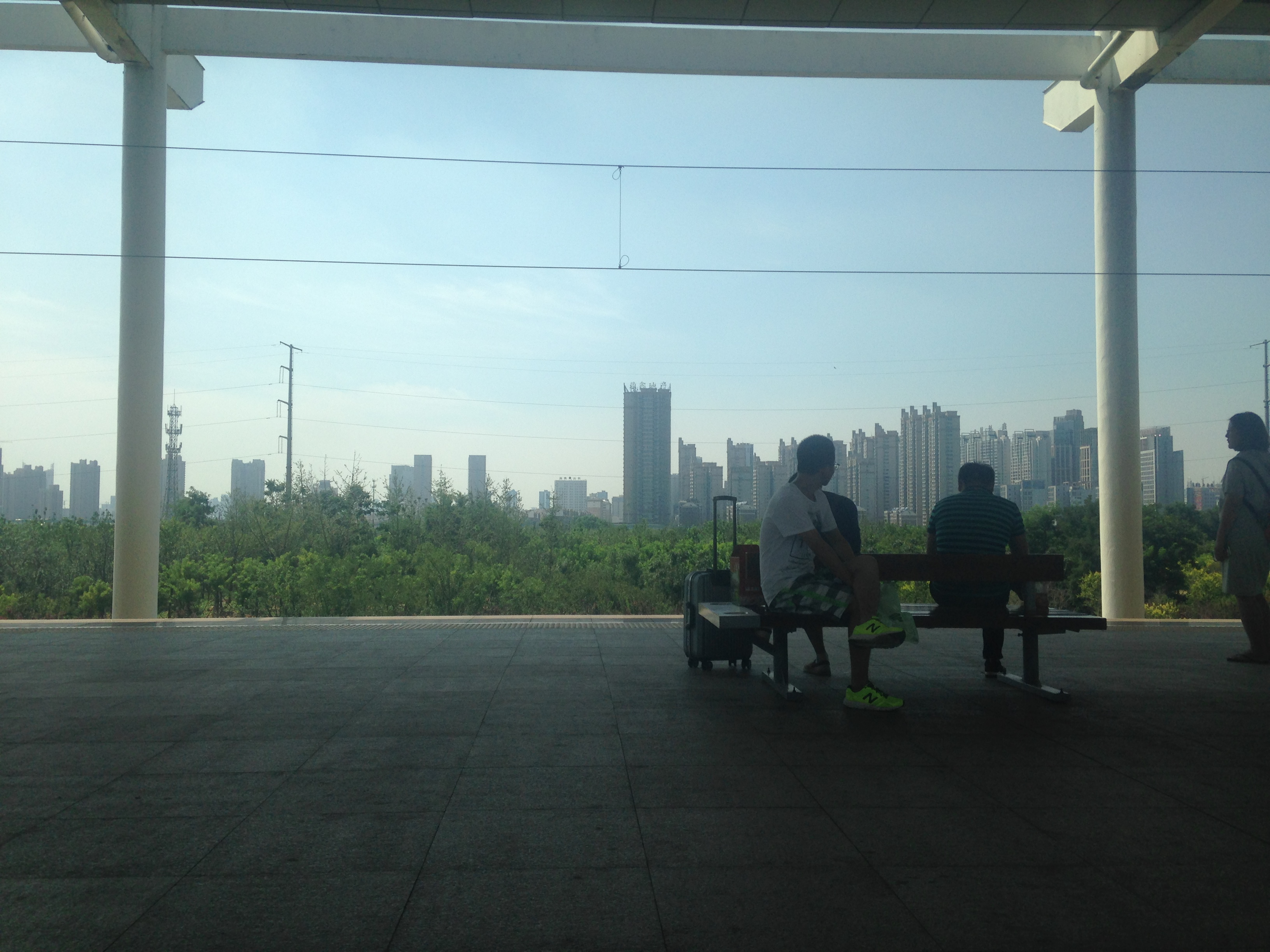 石武旅客専用線の列車内より望む邯鄲東駅のホーム